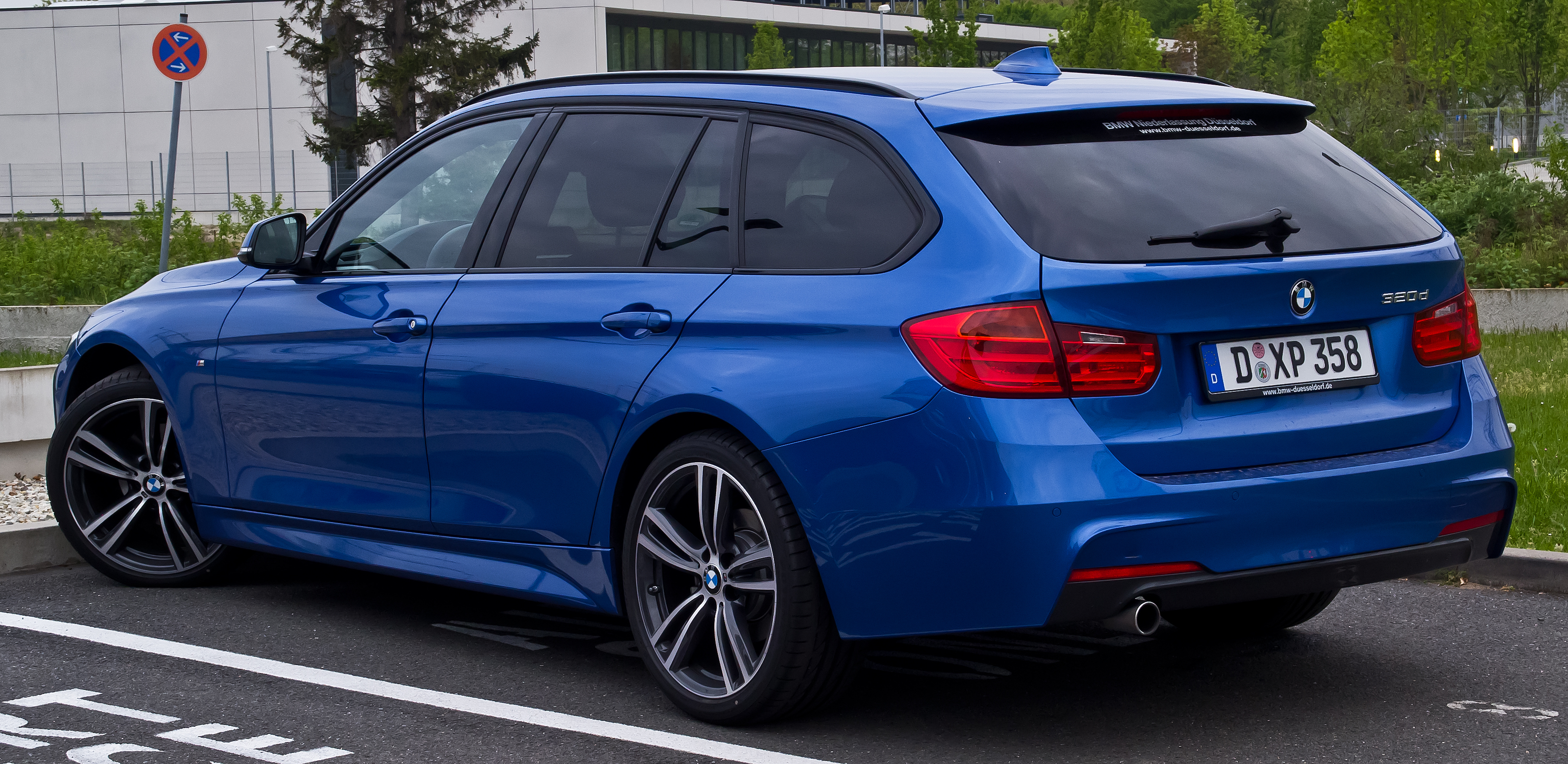 BMW 320d Touring M-Sportpaket (F31)